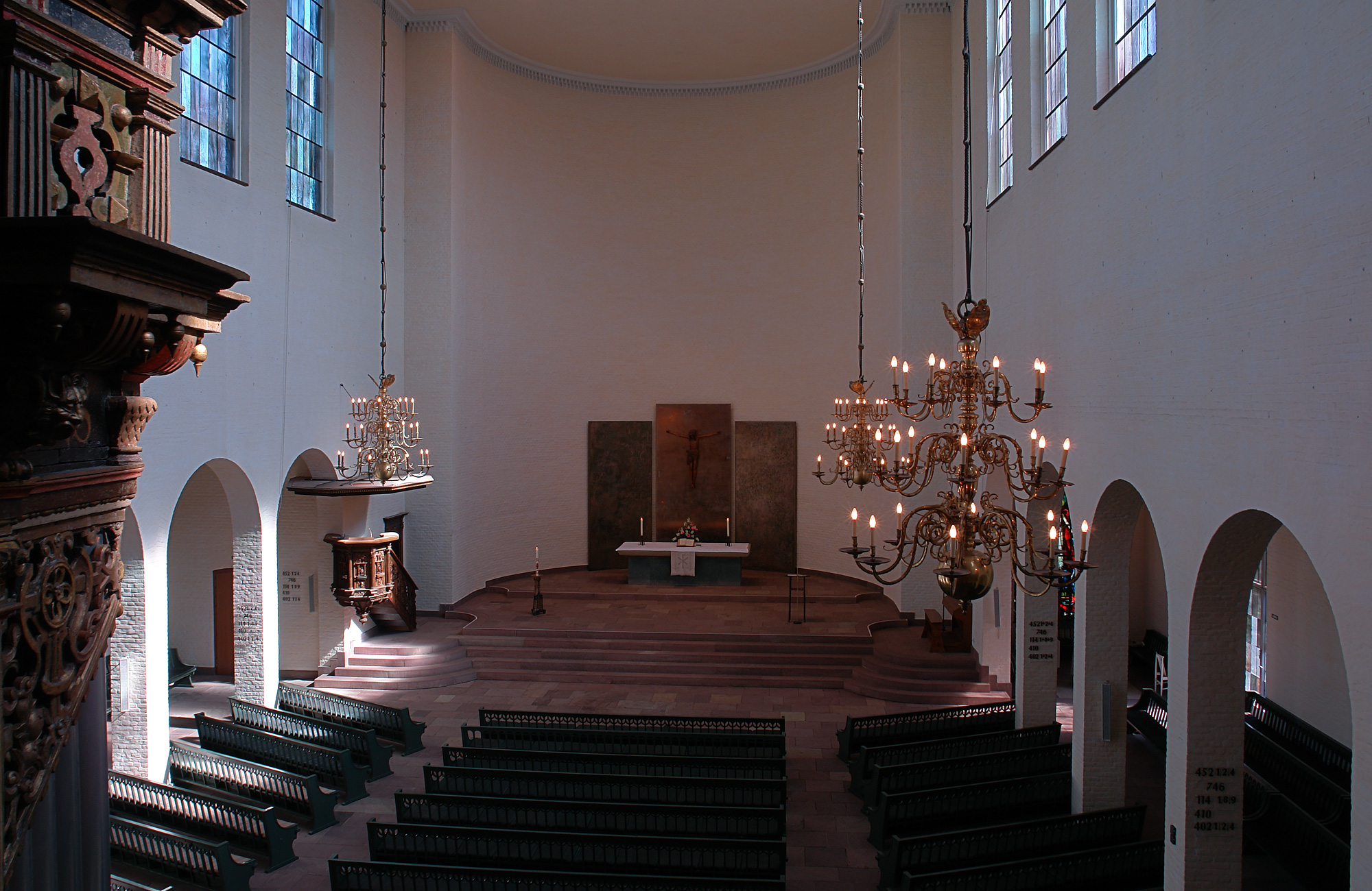 St.Ansgarii-Kirche in Bremen. Blick von der Orgel-Empore